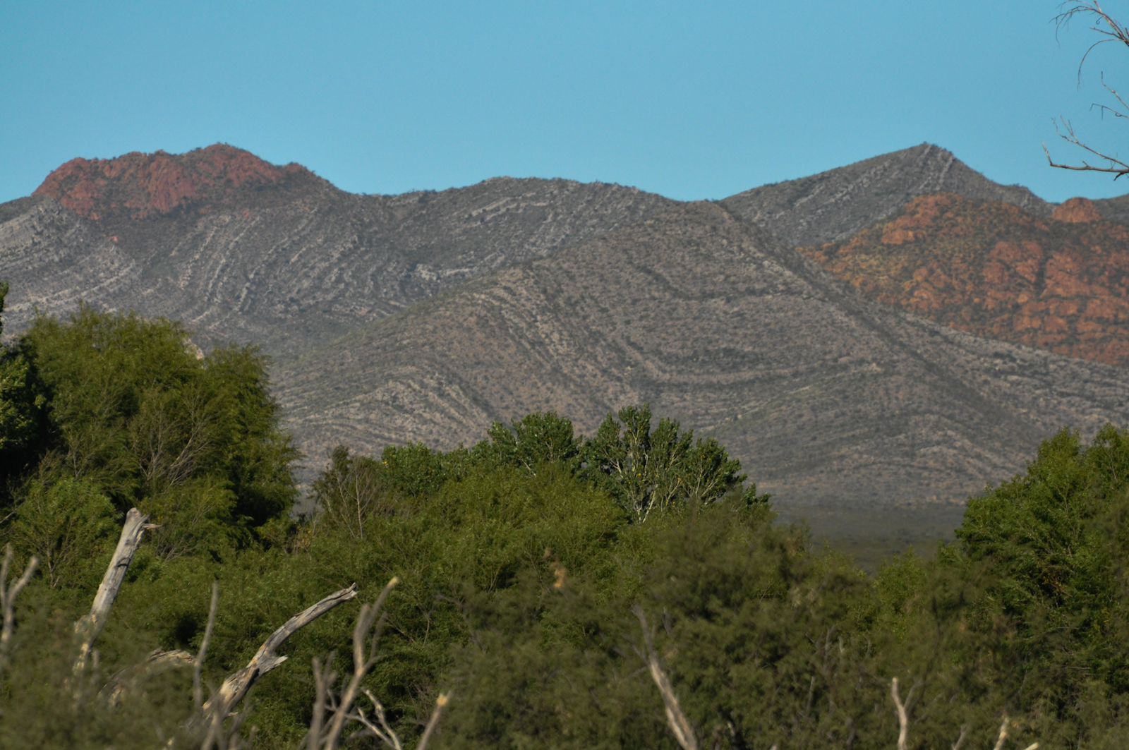 Mule Mountains, AZ